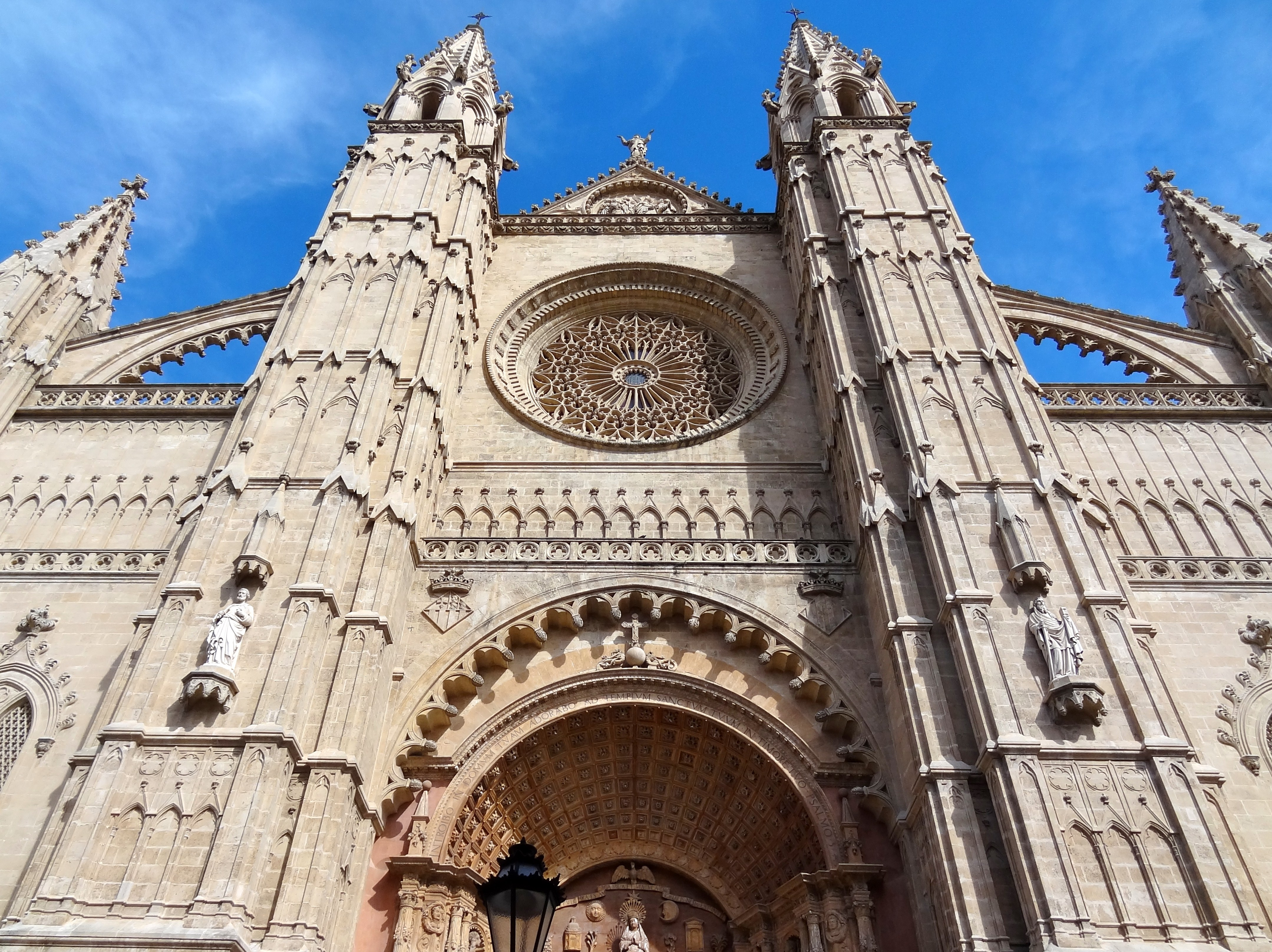 Portal der Kathedrale von Palma, Mallorca, Spanien